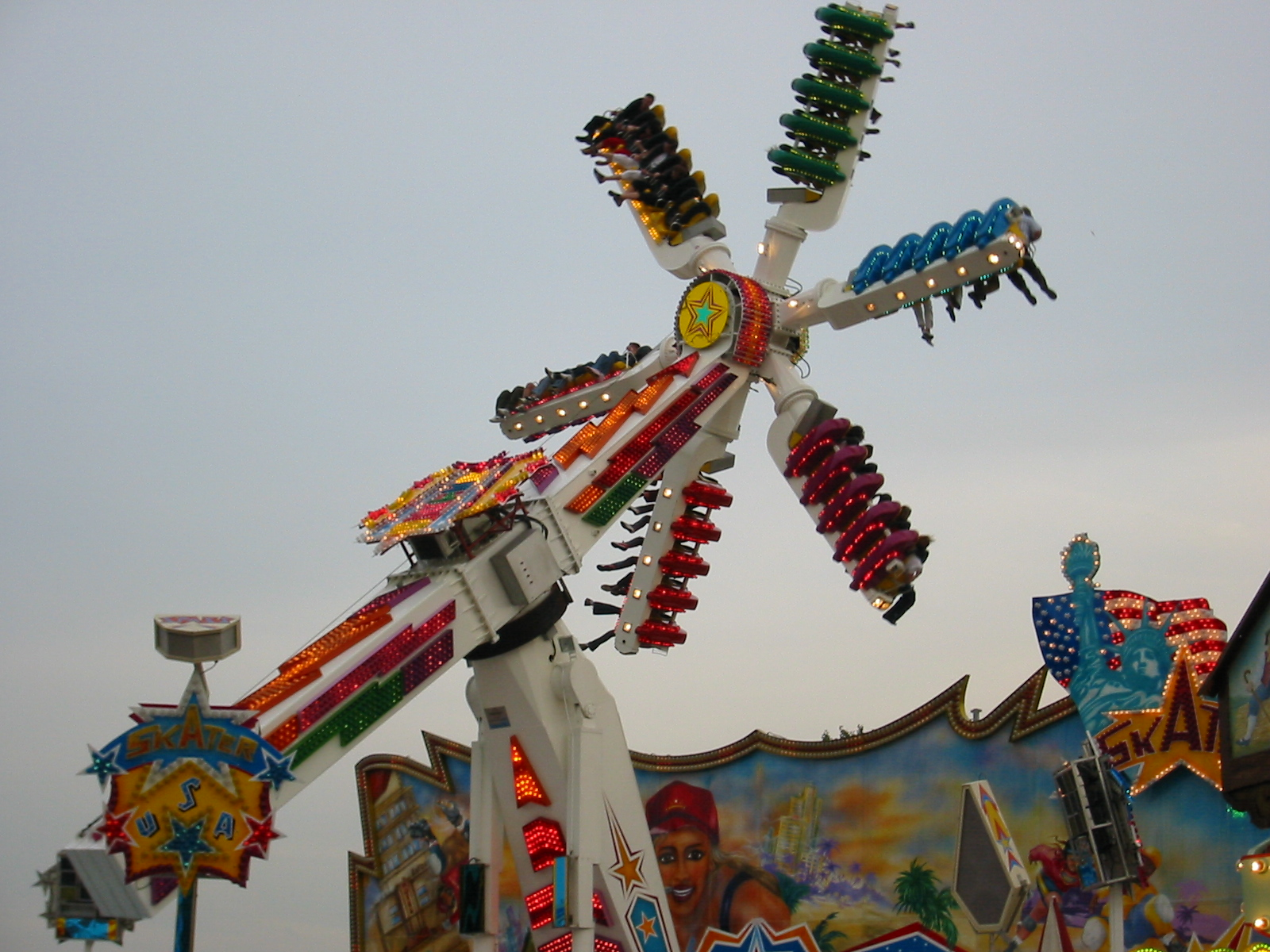 Hochfahrtgeschäft "Top Scan" des niederländischen Herstellers Mondial Rides.